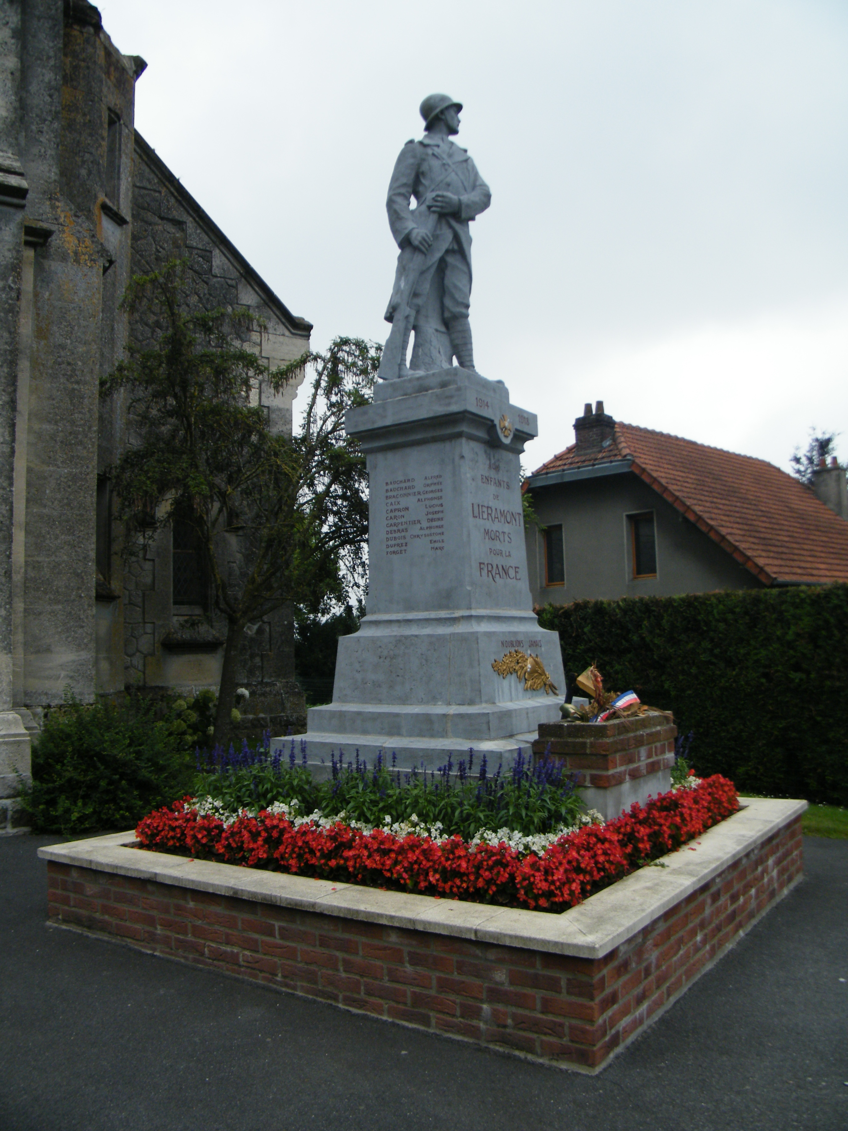 Monument aux morts pour la France.